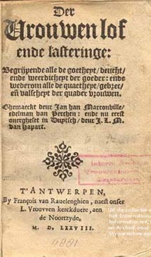 Vertaling uit het Frans van De la bonté et mauvaistié des femmes, 1563. Het traktaat bestaat uit twee delen, een lof en een lastering van vrouwen. De meeste hoofdstukken zijn gewijd aan een deugd of ondeugd, in sommige staan exemplarische vrouwen of opmerkelijke geschiedenissen centraal. Voordat er oorspronkelijke Nederlandse vrouwenloven verschenen in de zeventiende eeuw, genoot dit werk populariteit in de Republiek en het heeft in de Nederlandse traditie een belangrijke rol gespeeld. (ontleend aan bron webpagina op atria.nl)